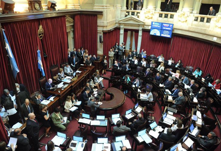 Votación de la Ley 26904, sancionada el 13 de noviembre de 2013